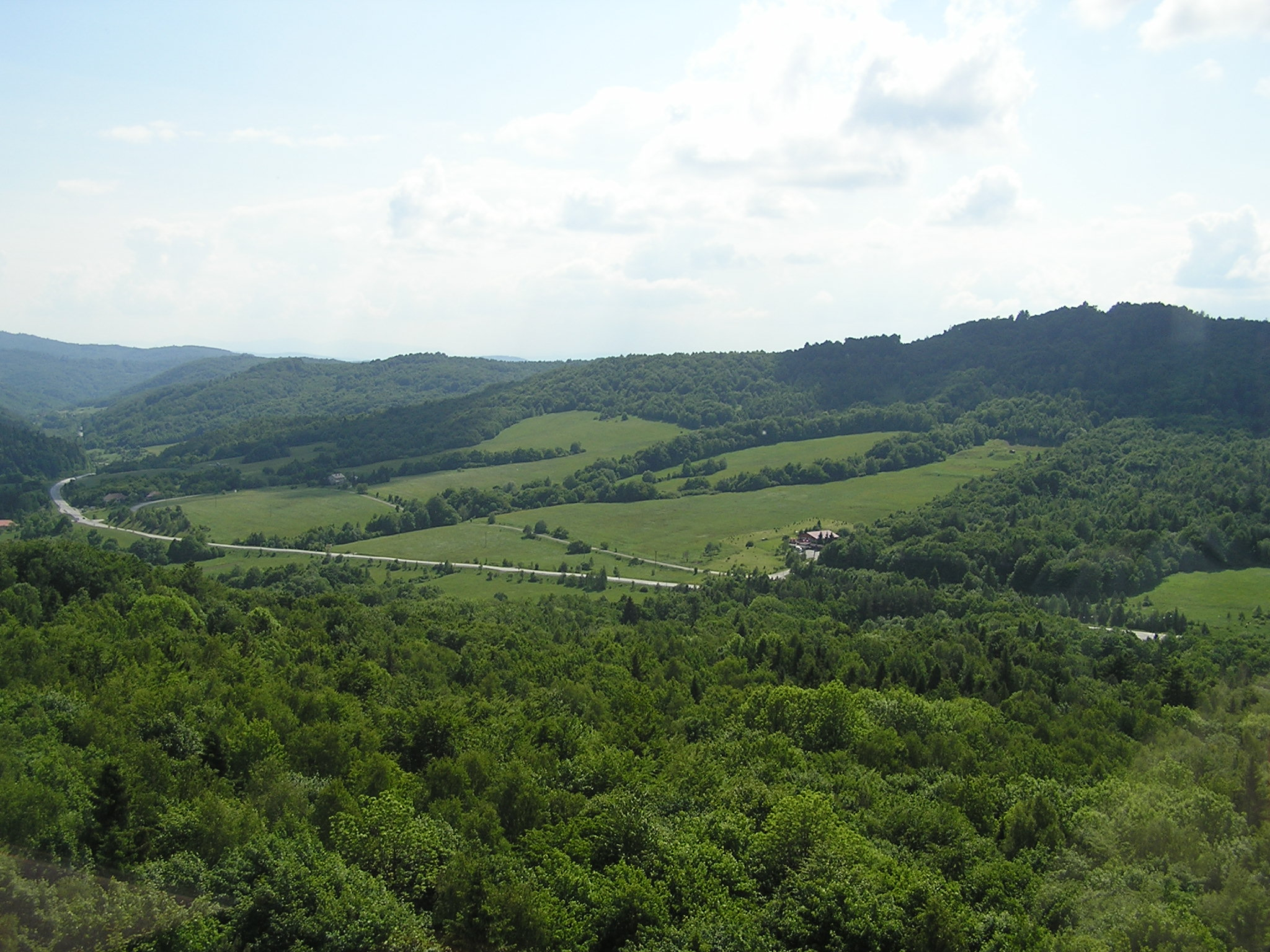 Panoráma duklianskeho priesmyku. Jediná komunikácia, ktorou útočiace vojsko s ťažkou vojenskou technikou na jeseň roku 1944, mohlo postupovať smerom na Prešov. O jej ovládnutie boli zvedené ťažké boje s obrovskými ľudskými stratami.